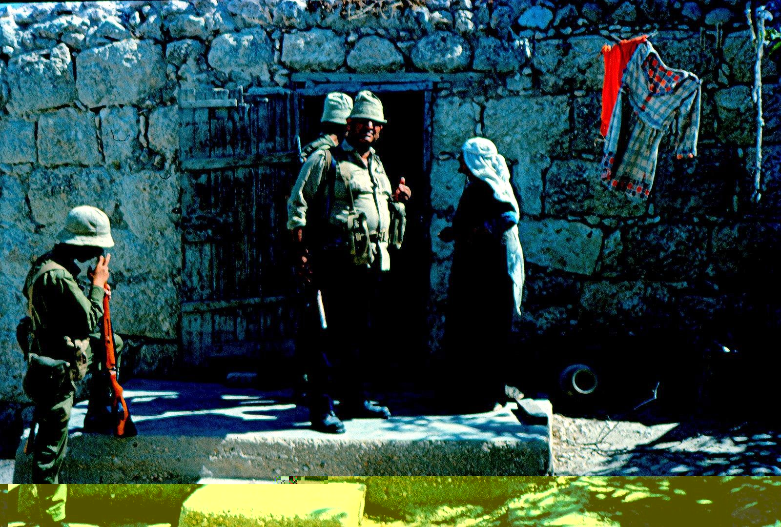 עמואס היה כפר ערבי ששכן עד שנת 1967 באזור מובלעת לטרון. הכפר נכבש במלחמת ששת הימים תושביו פונו והכפר נהרס על ידי צה"ל.